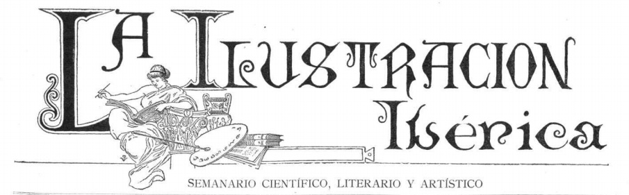 Darrer logotip de la revista La Ilustración Ibérica (Barcelona, 10 de gener de 1891) num.419